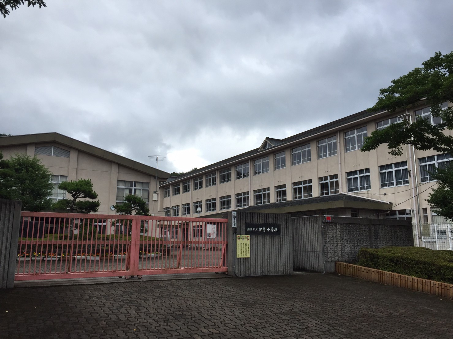 姫路市立伊勢小学校